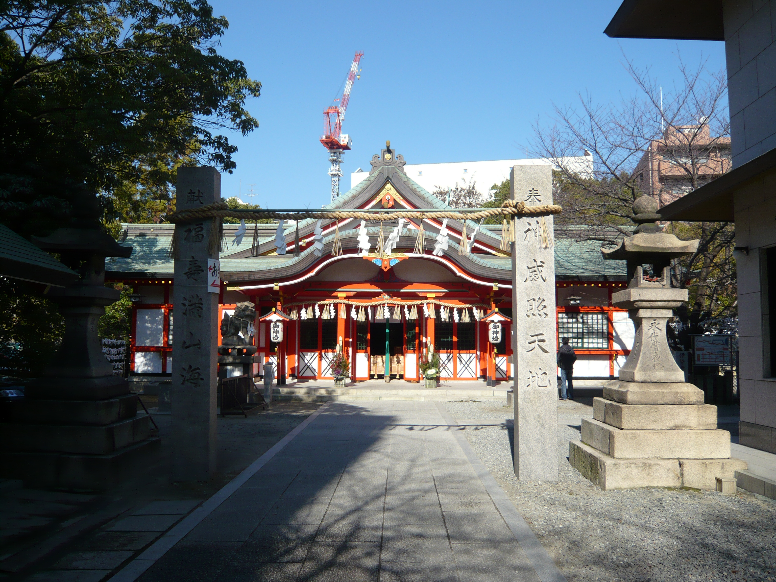 Tamatsukuri-inari-jinja, Chūō, Ōsaka, Ōsaka, Japan: The gate is a rare shime-torii 玉造稲荷神社（大阪市中央区） 拝殿